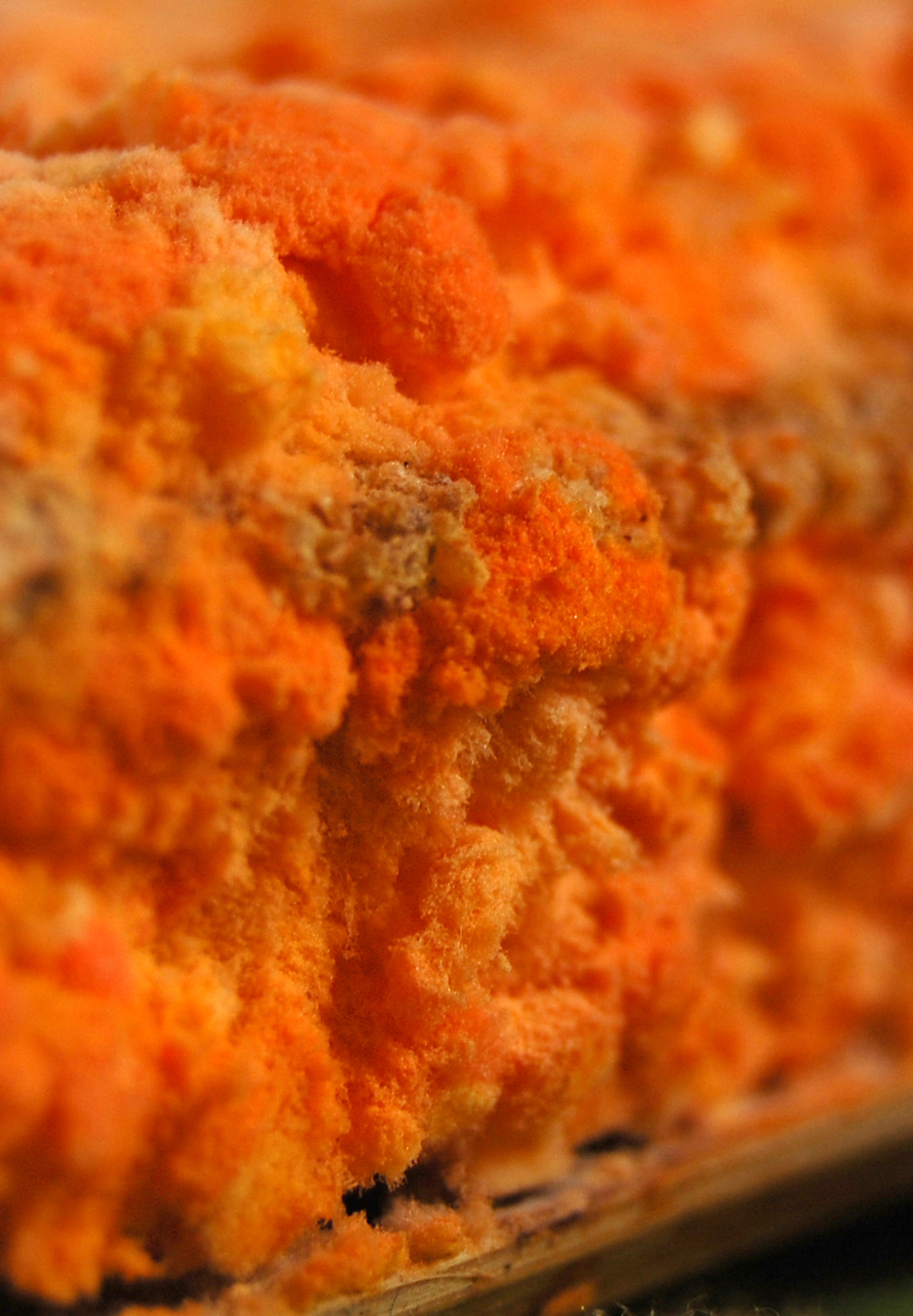 Oncom